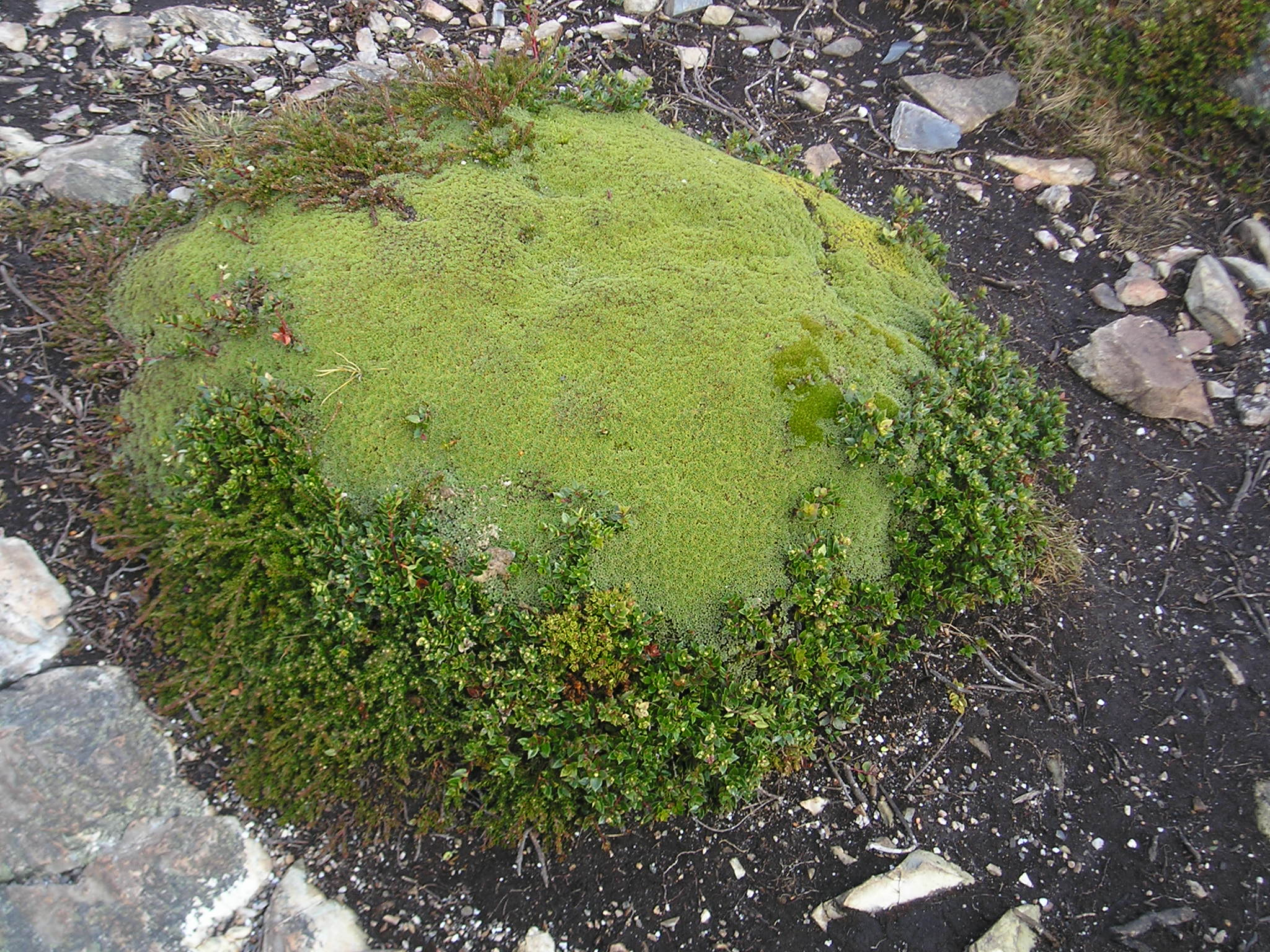 Yareta (Azorella compacta) at Isla Bridges, - Beagle Channel, Argentinian Tierra del Fuego